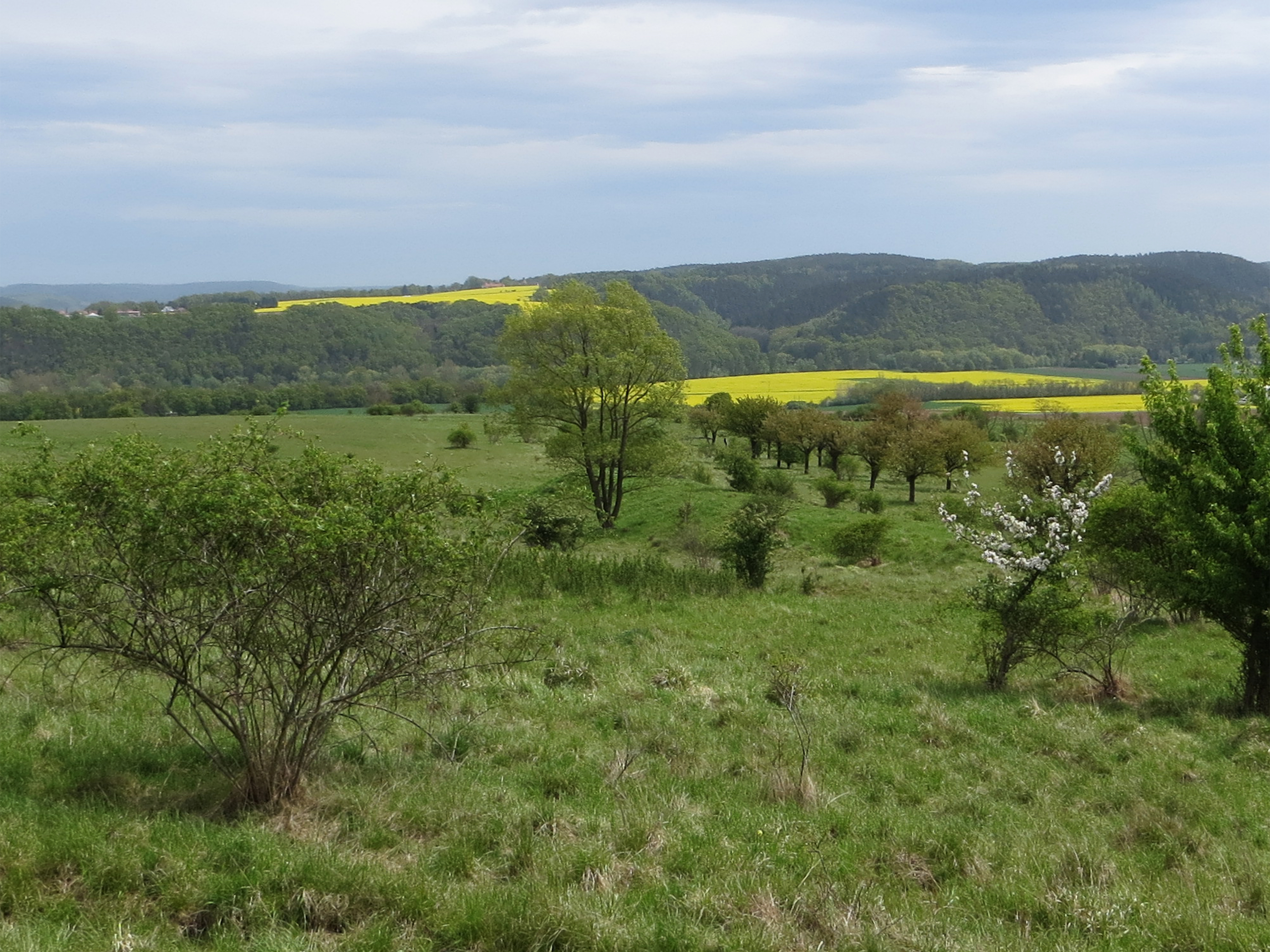 Blick vom NSG Spitzenberg-Schießplatz Rothenstein-Borntal nach Schiebelau Richtung Osten ins Saaletal